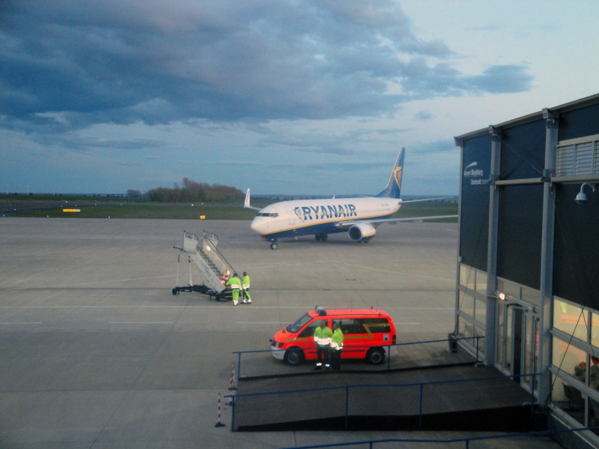 Ankunft der Ryanair aus Mallorca. Rechts: Passieraufgang zur Ramp